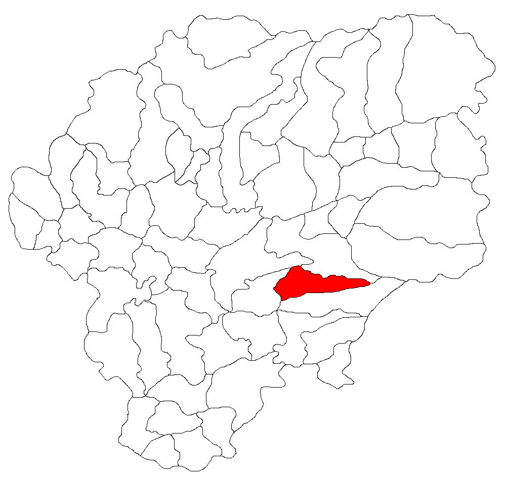 Categorie:Hărţi ale judeţului Bistriţa-Năsăud